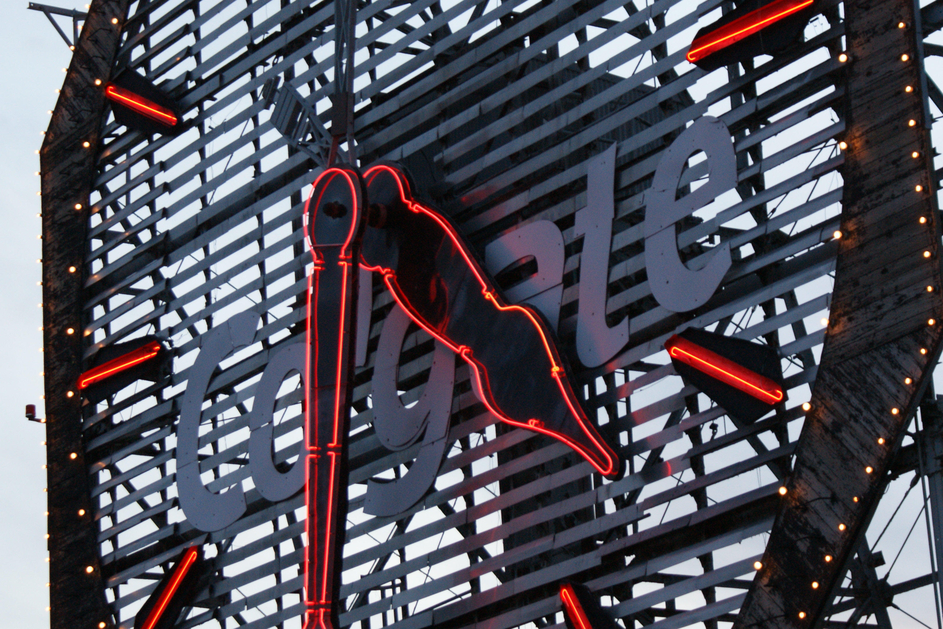 Großaufnahme der Colgate Uhr in Jersey City, New Jersey